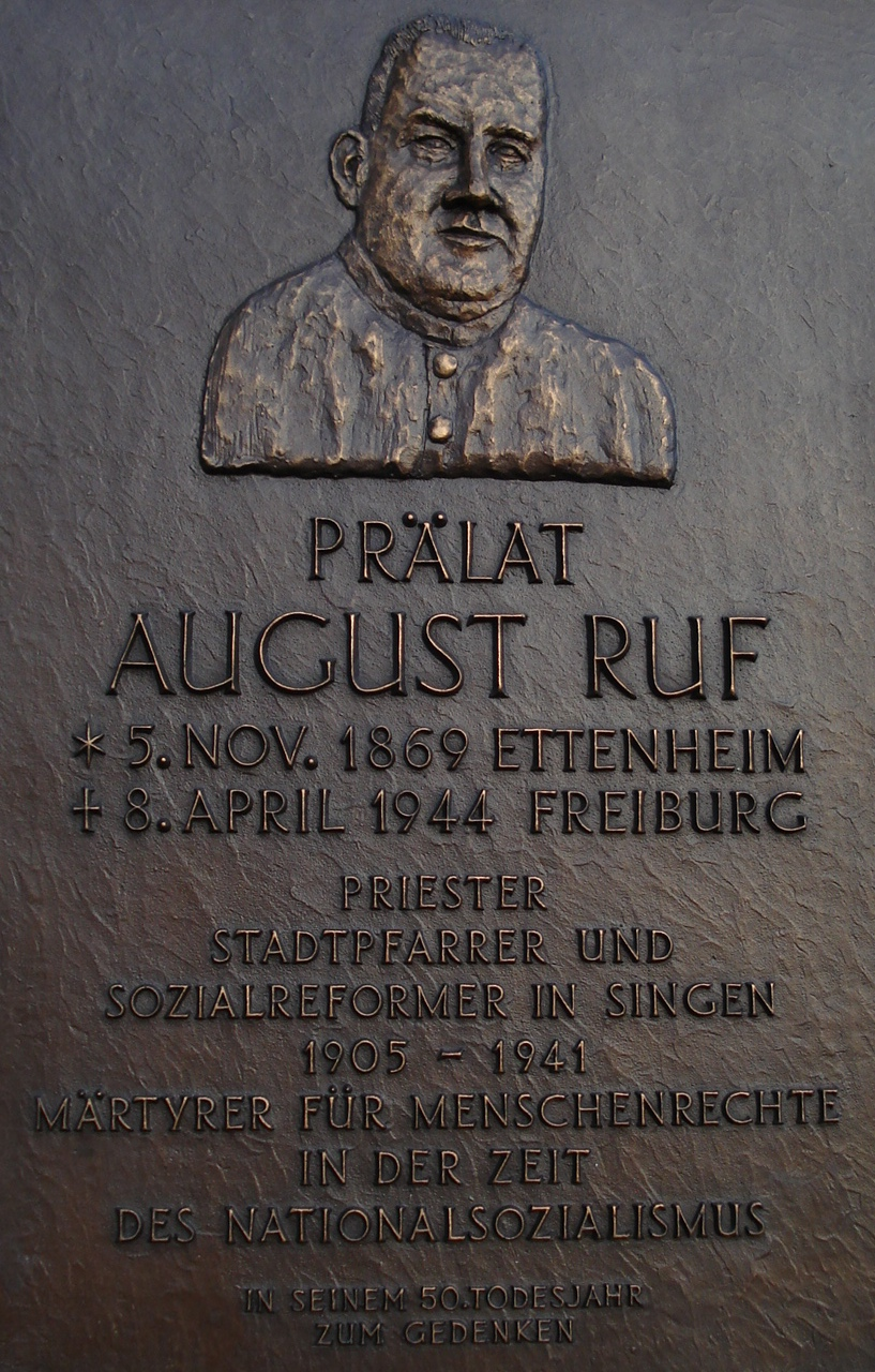 Erinnerungstafel an August Ruf neben der Eingangstür zur Kirche St.Peter und Paul in Singen/Hohentwiel